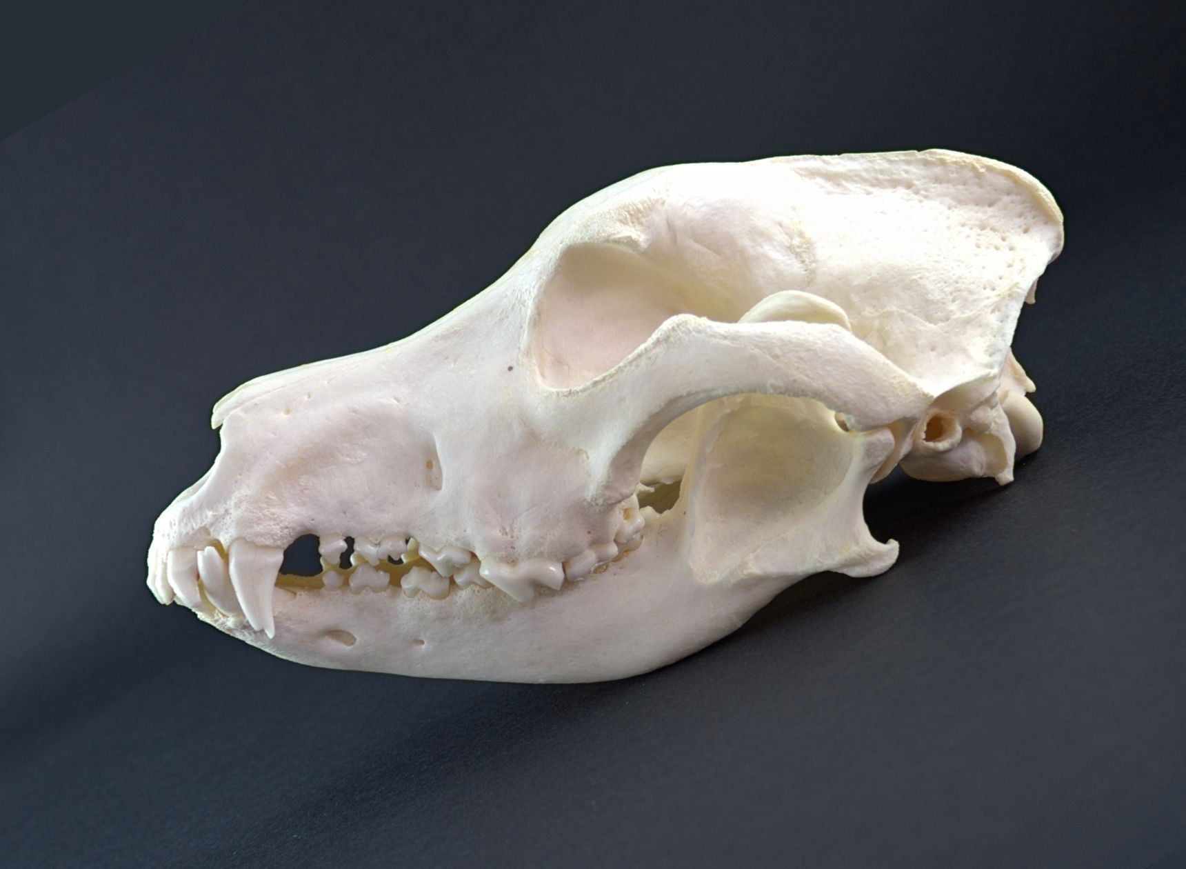 Natürlicher Schädel eines Hundes (Schäferhund)